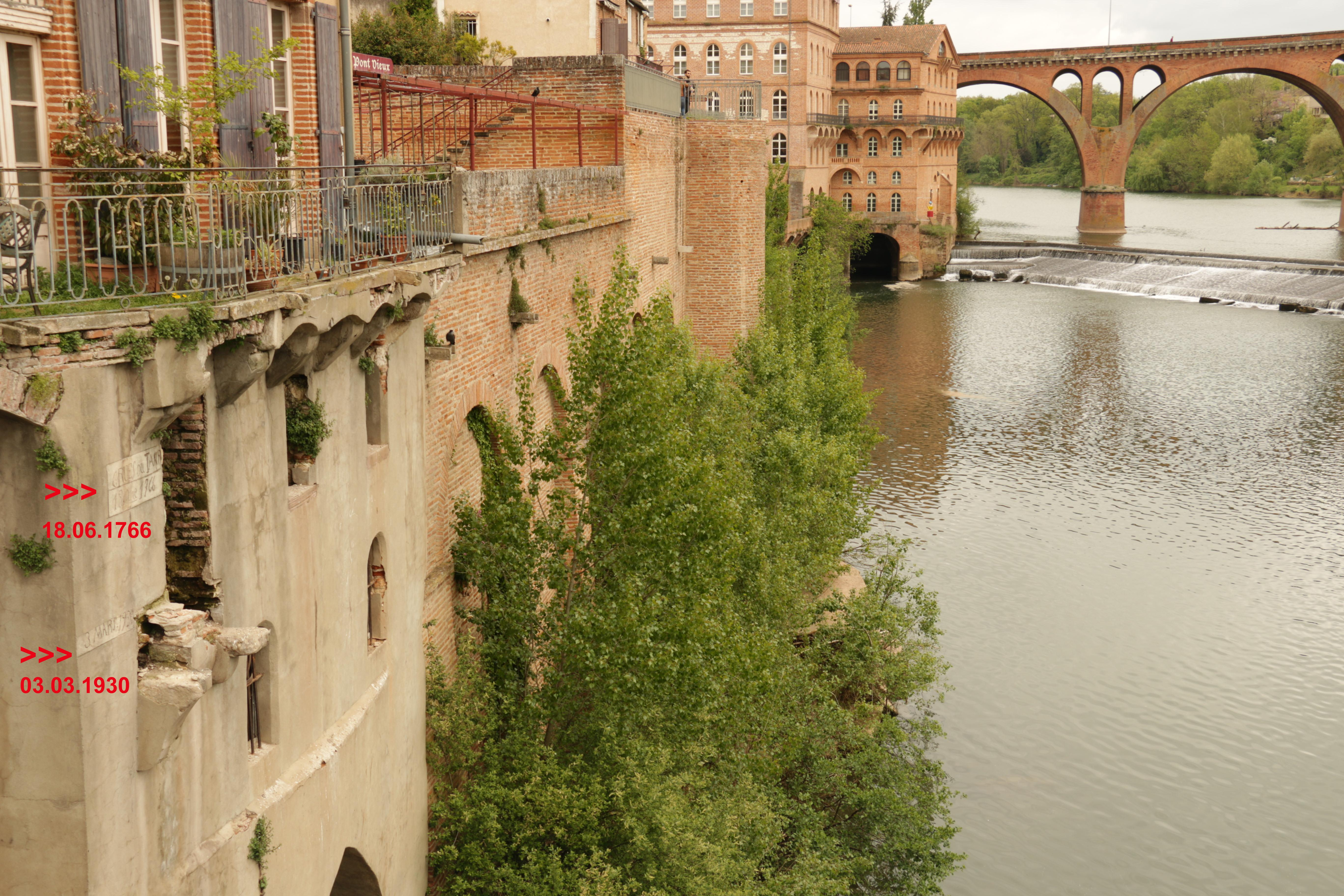 Hochwassermarken an einem Haus am Tarnufer in Albi.